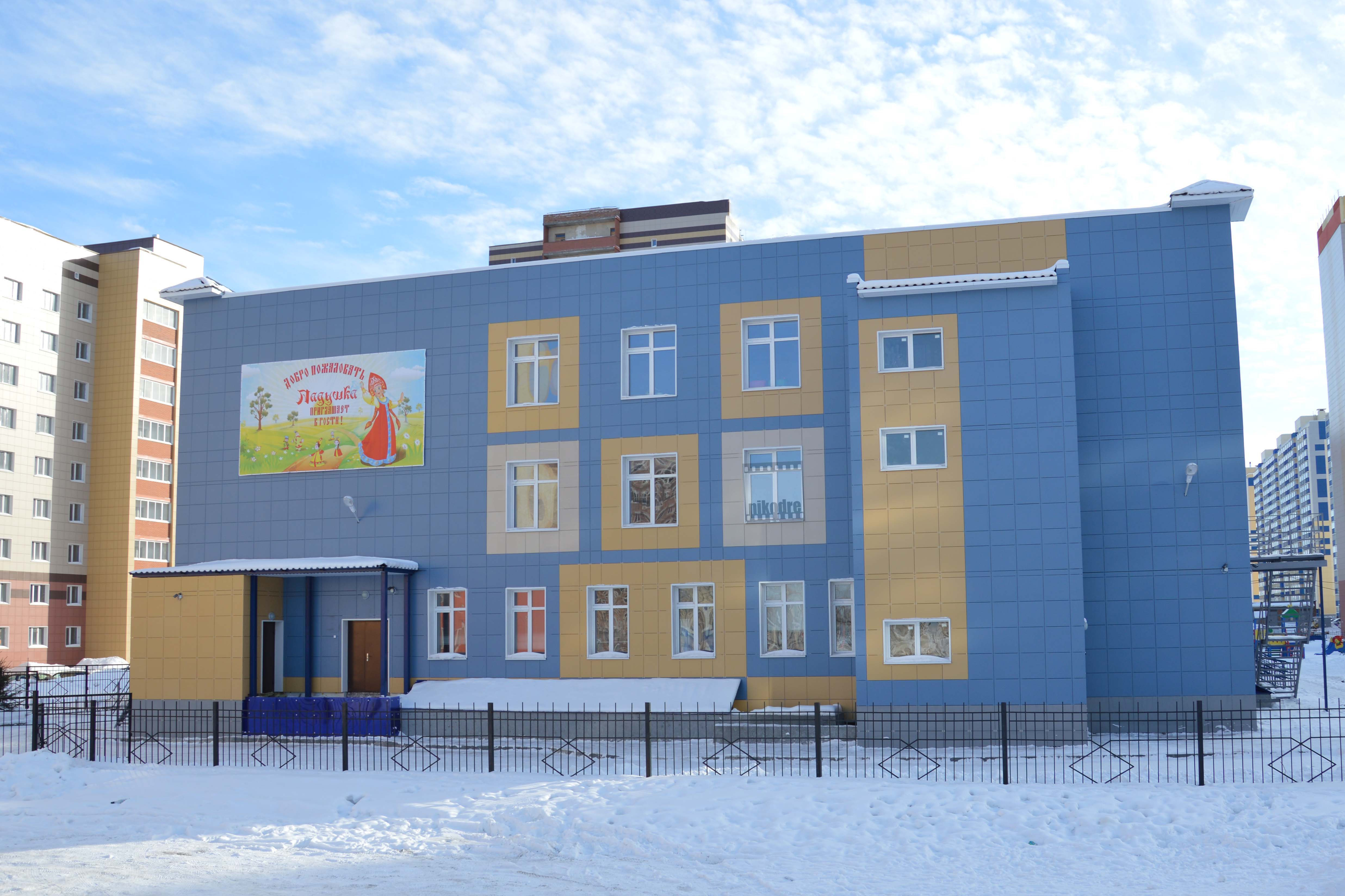 Детский сад на улице Виктора Уса (Новосибирск)